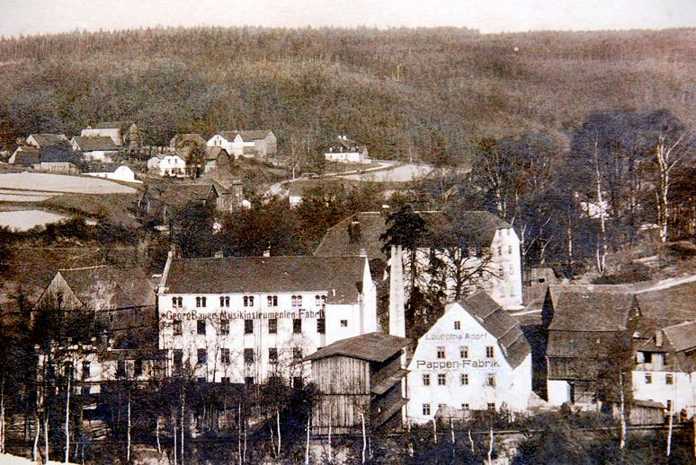 Pappen- und Musikinstrumentenfabrik am Standort Hammermühle Leubetha in den 1930er jahren